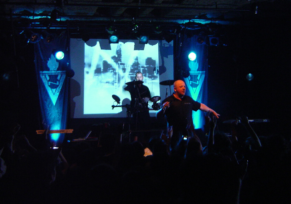 VNV Nation en vivo en Buenos Aires, Argentina, el 23 de agosto de 2006